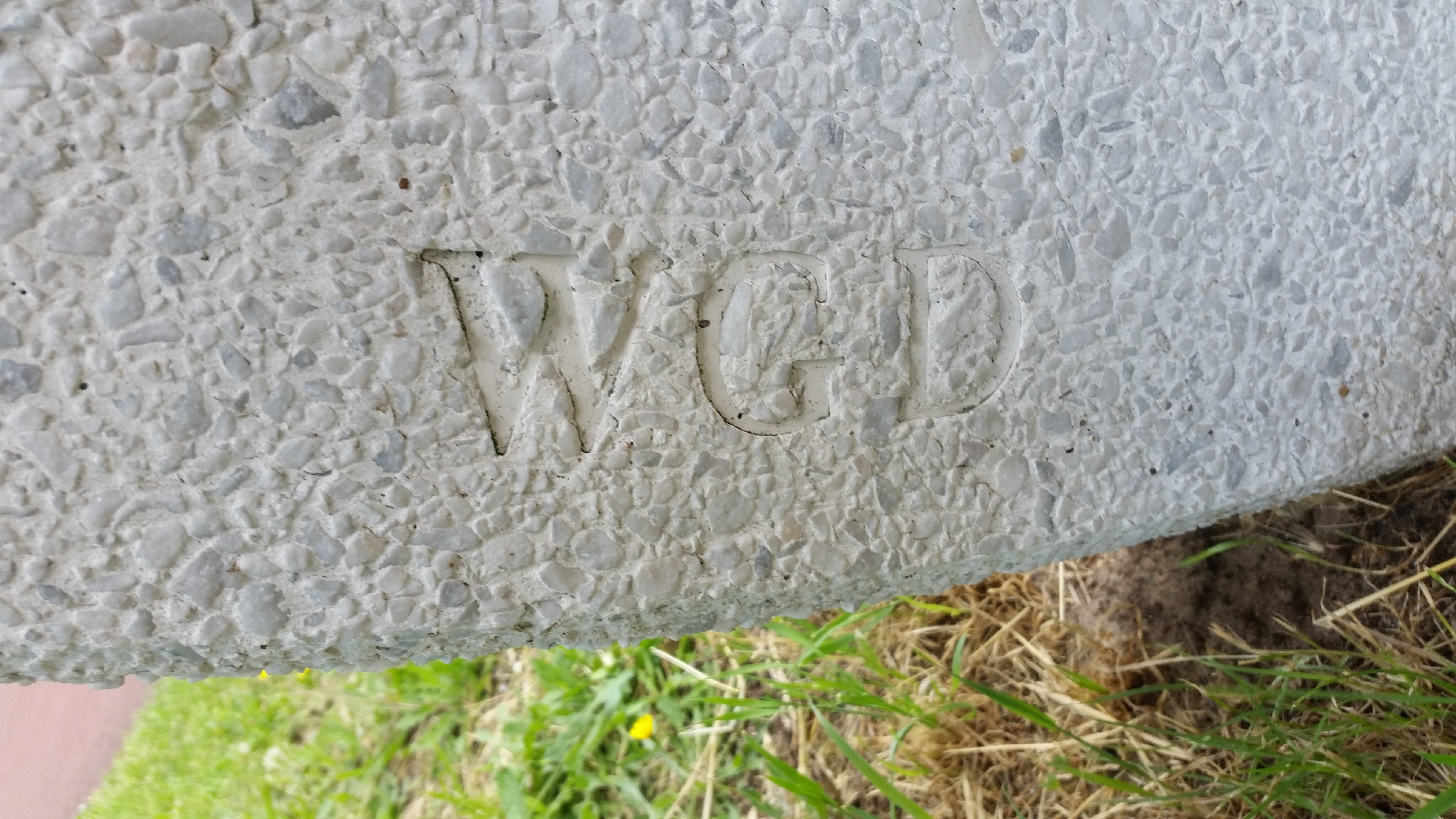 WDG (Wendela Gevers Deynoot) op Het geheim en het bewijs